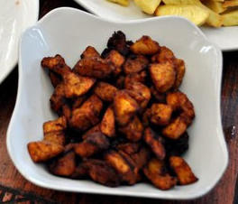 Waakye, Kelewele & Fried Yaw